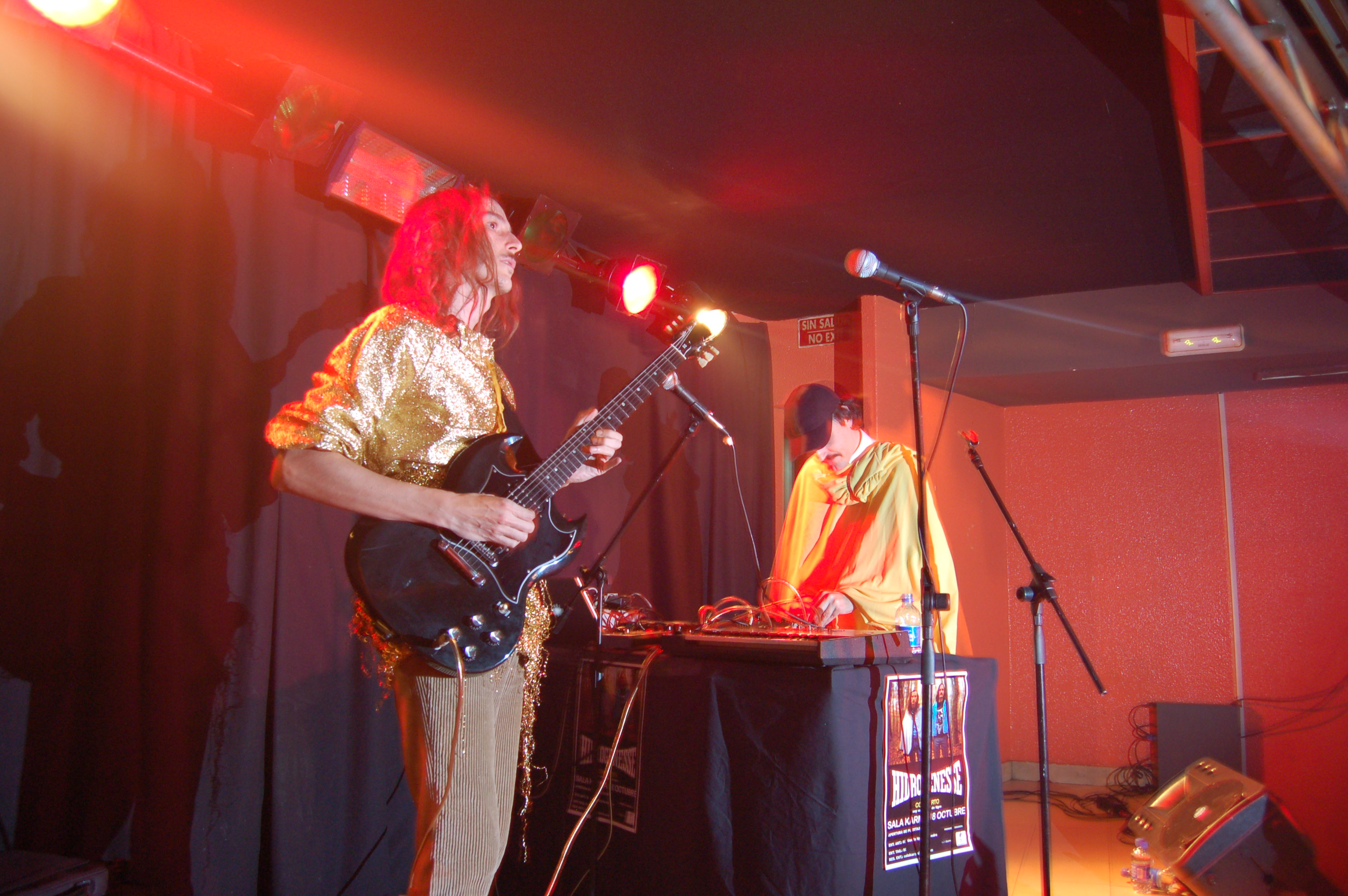 concerto de hidrogenesse en Pontevedra, 18 de outubro de 2008 Categoría:Imaxes de personalidades da música